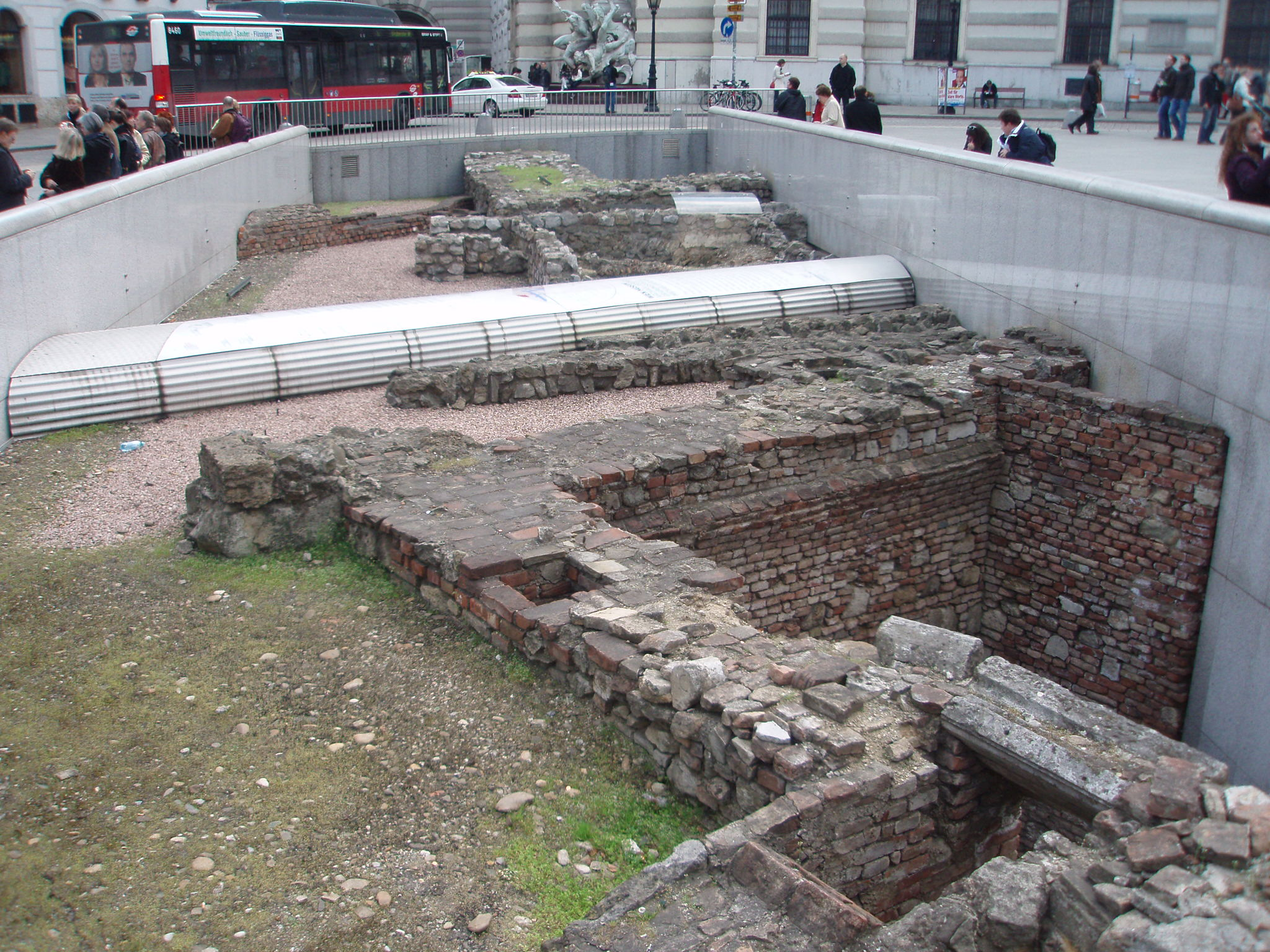 Michaelerplatz